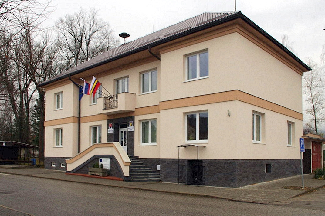 Ob. urad